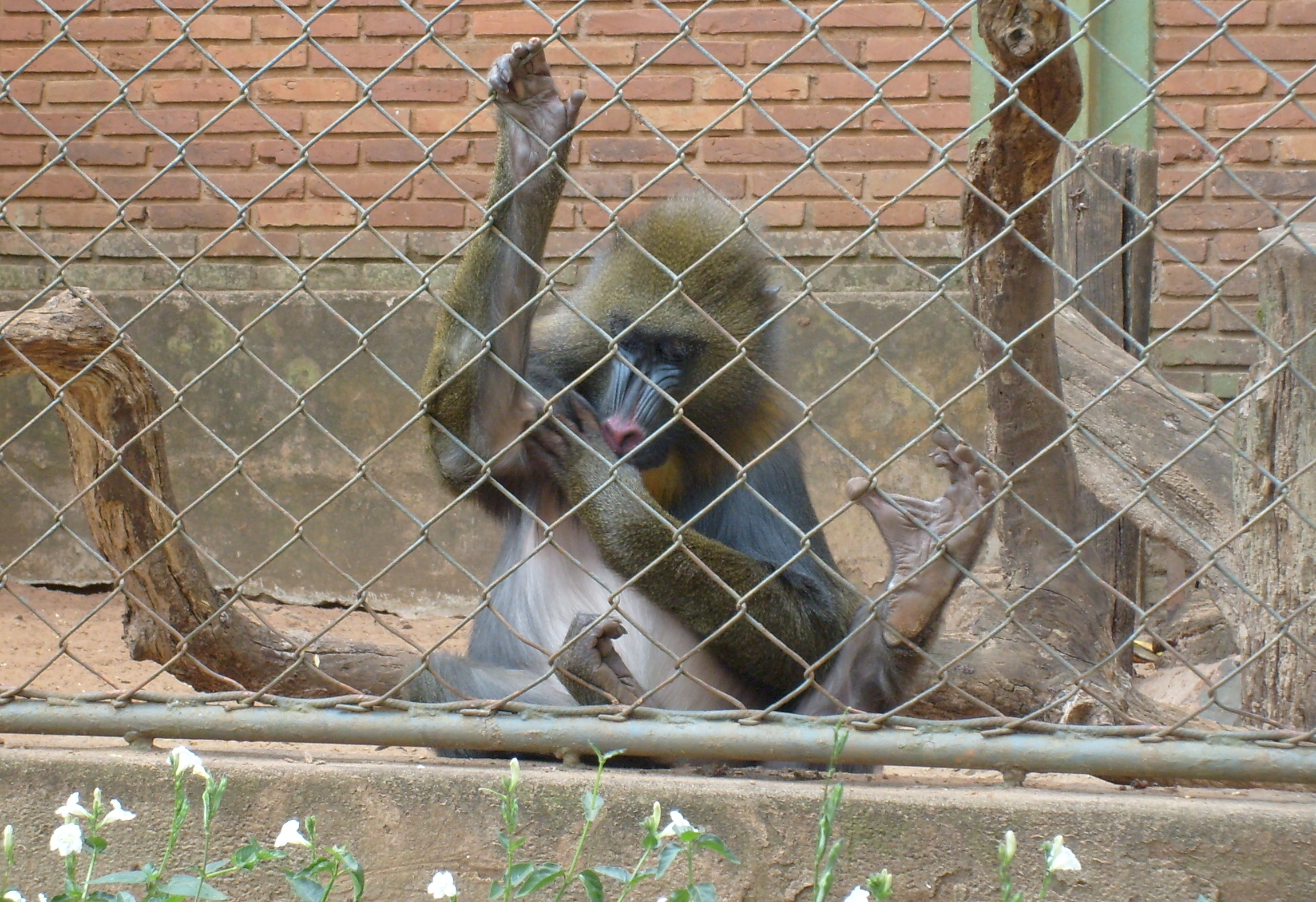 Mandrill at a Brazilian Zoo in Sao Paulo